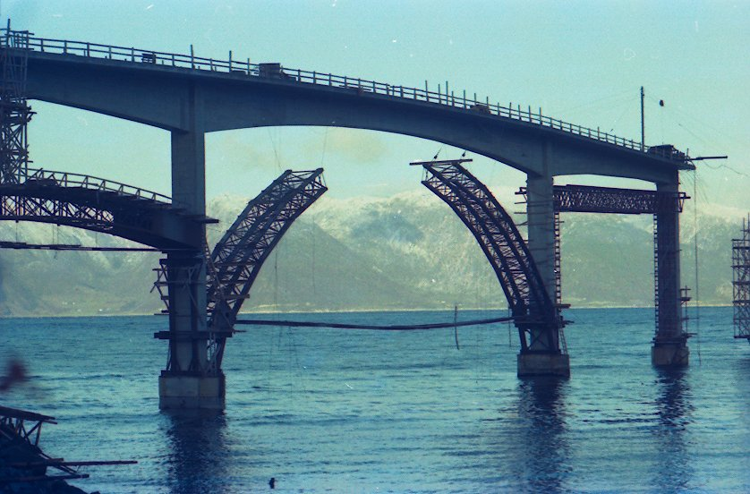 Bilde fra bruanlegget, bildet viser kontruksjon av midtspennet av brua